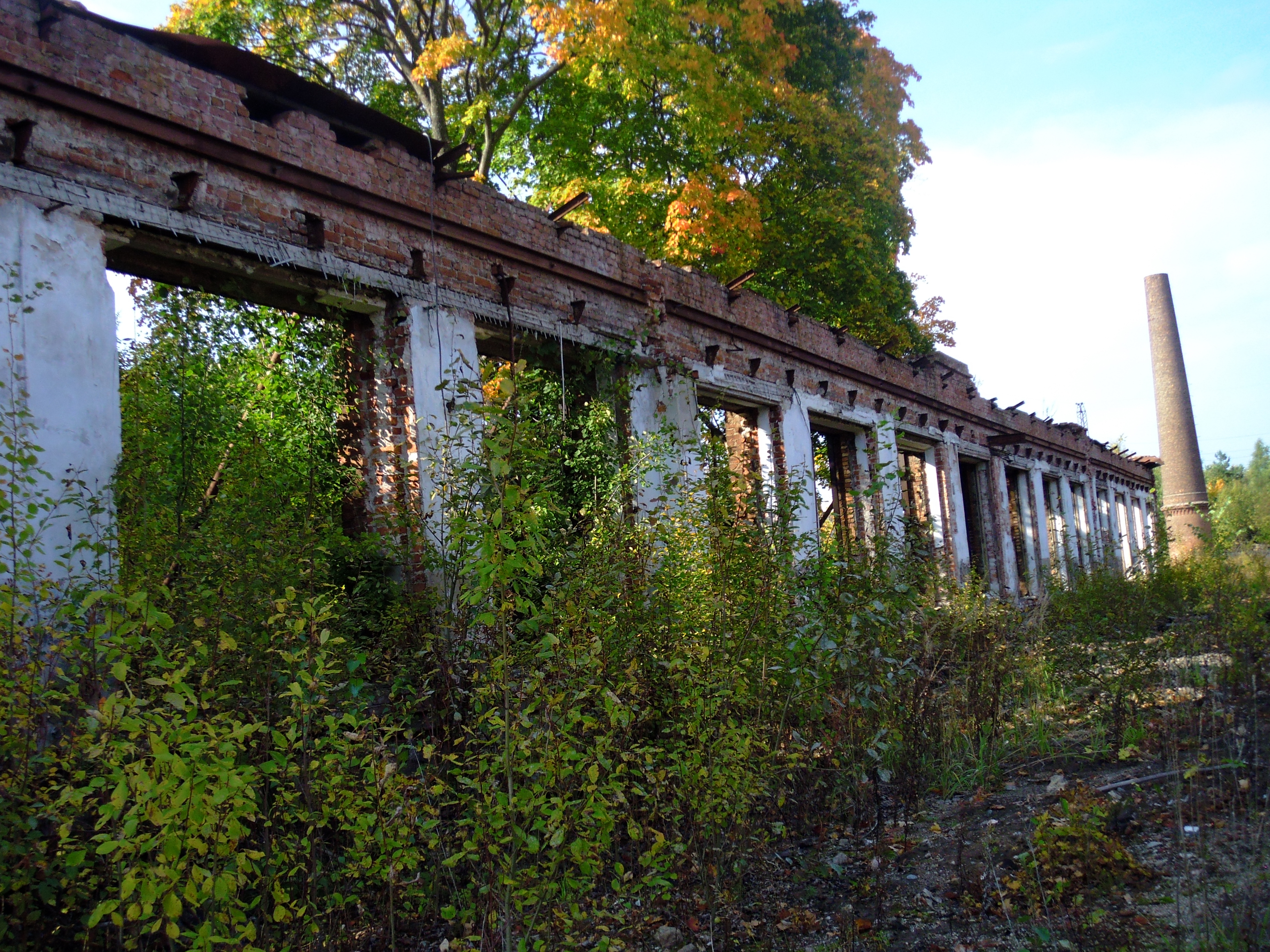 Сестрорецк. Петровский Арсенал. Цех метчиков №7 по состоянию на 2014 год. Памятник культурно-исторического наследия регионального уровня охраны КГИОП СПб.